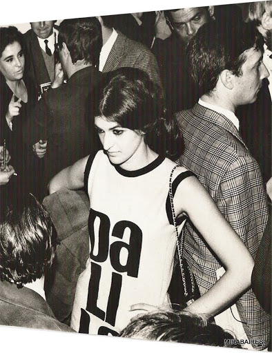 Dalila Puzzovio en vernissage instituto Di tella